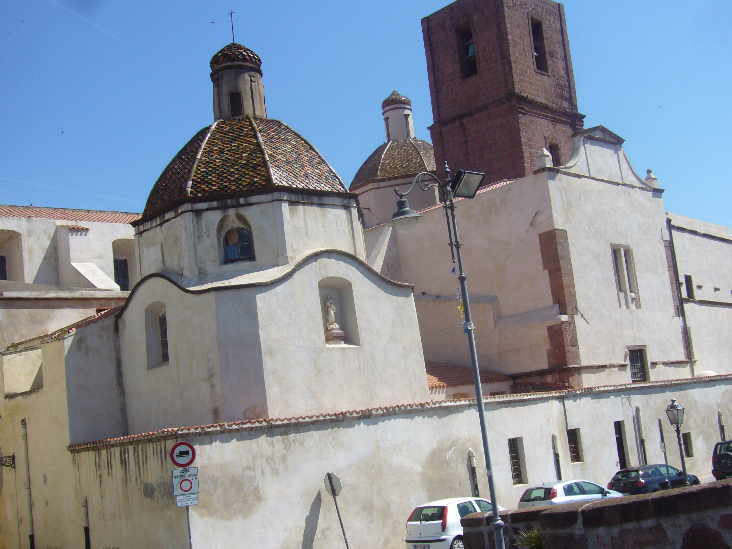 Cattedrale di Bosa